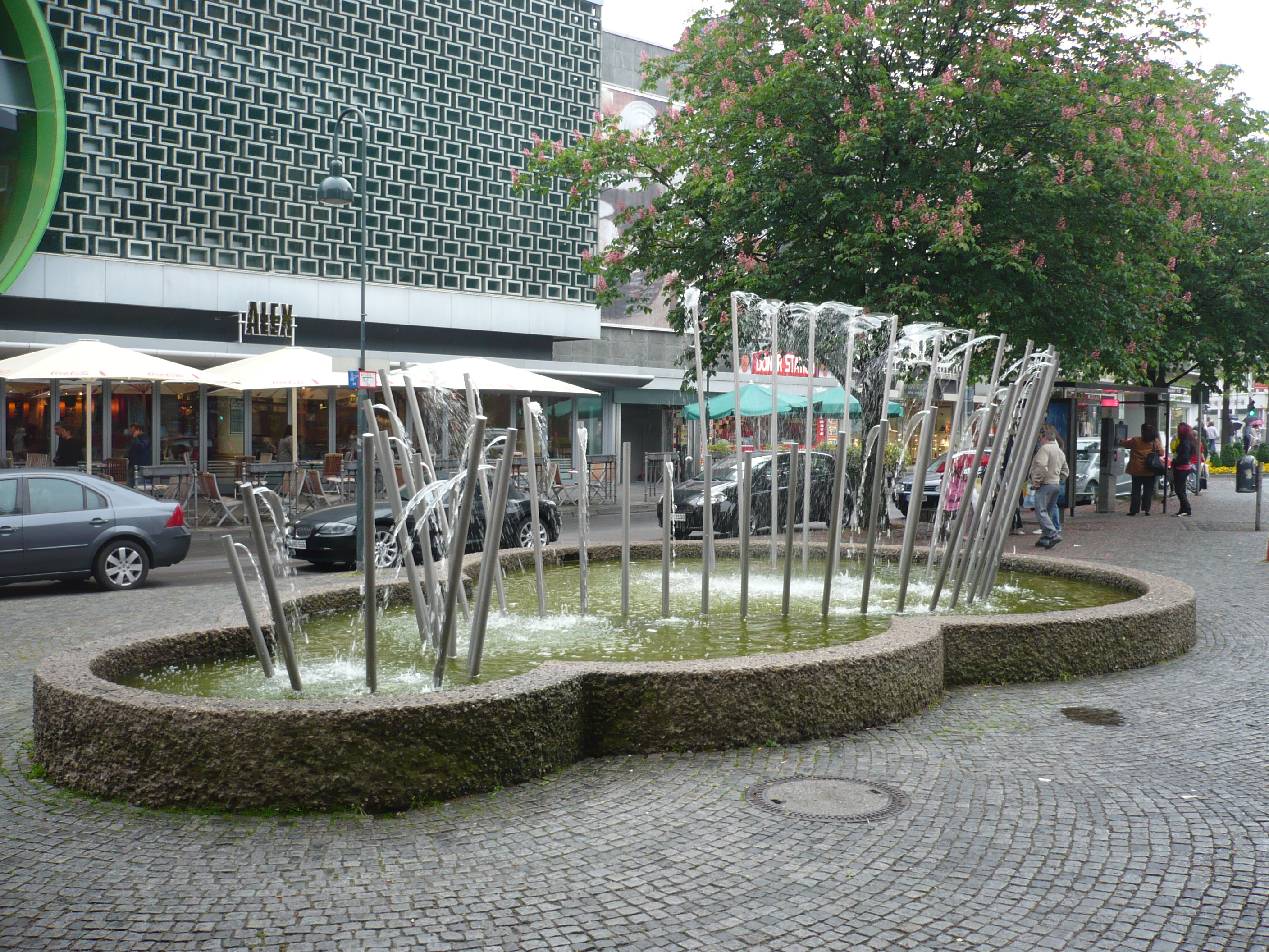 Röhrenbrunnen in der Komphausbadstraße in Aachen. Heinz Tobolla, 1971